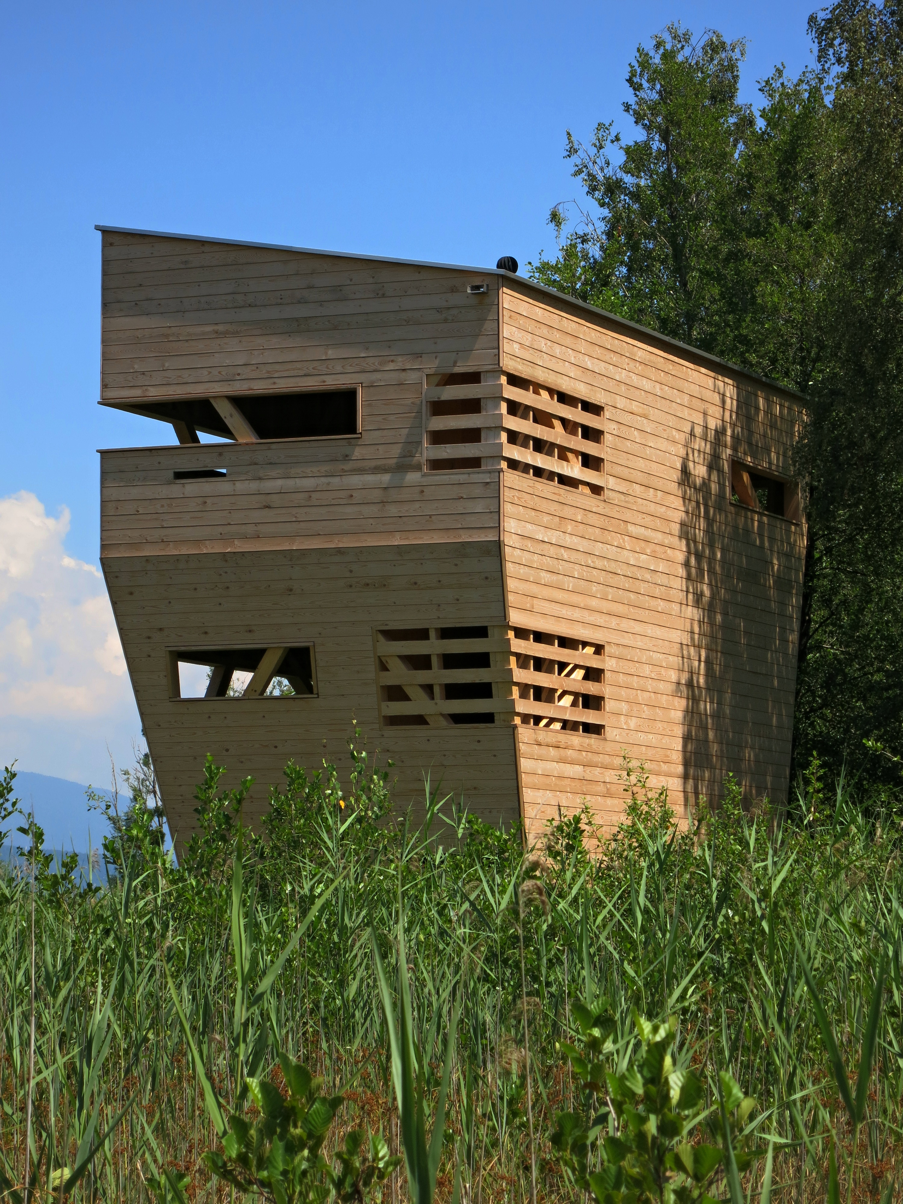 Champ Pittet-Turm